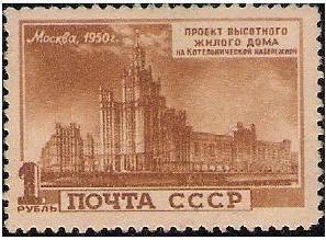 Почтовая марка СССР № 1582. Проект высотки на Котельнической набережной.